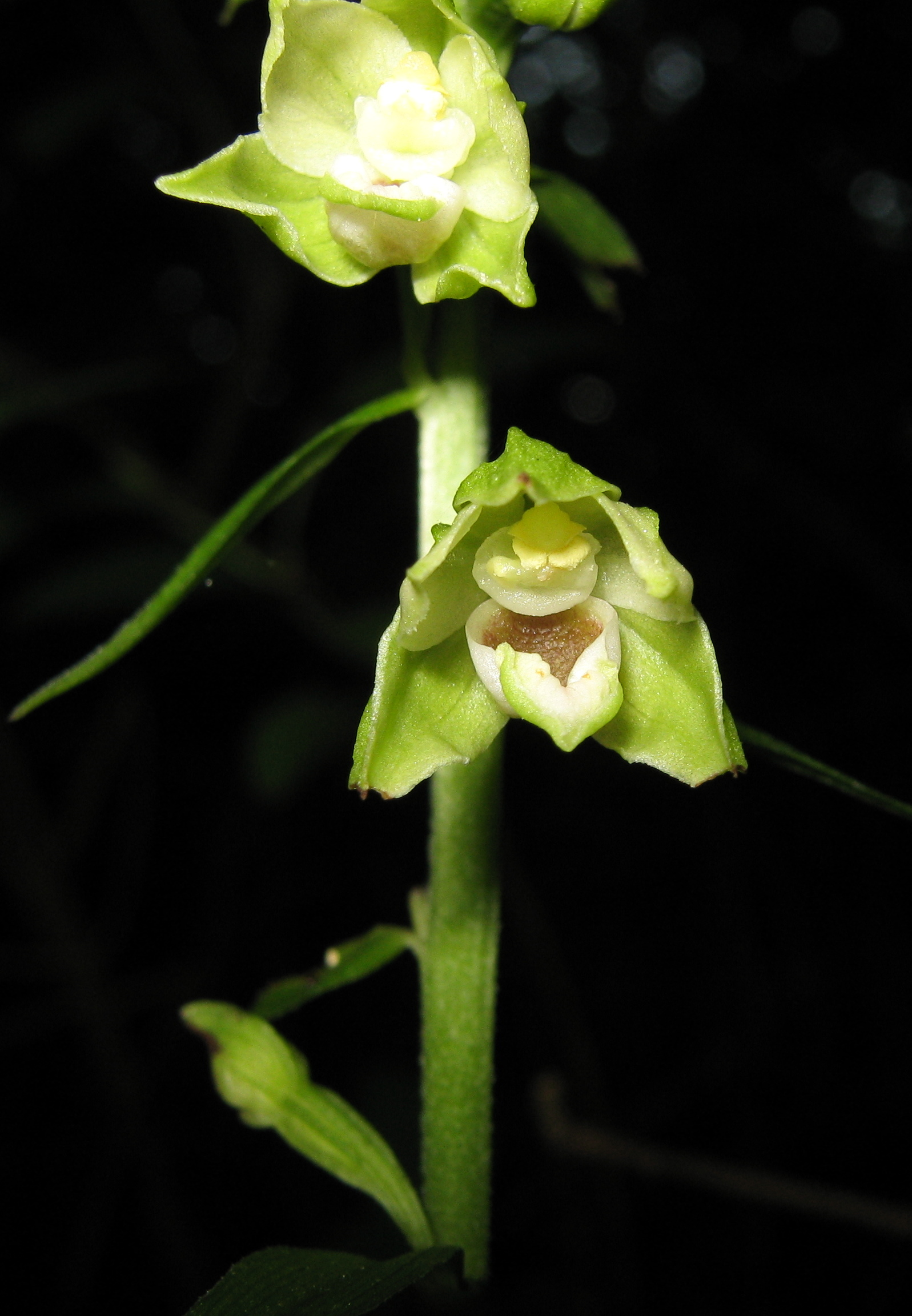 Epipactis albensis, Blüte